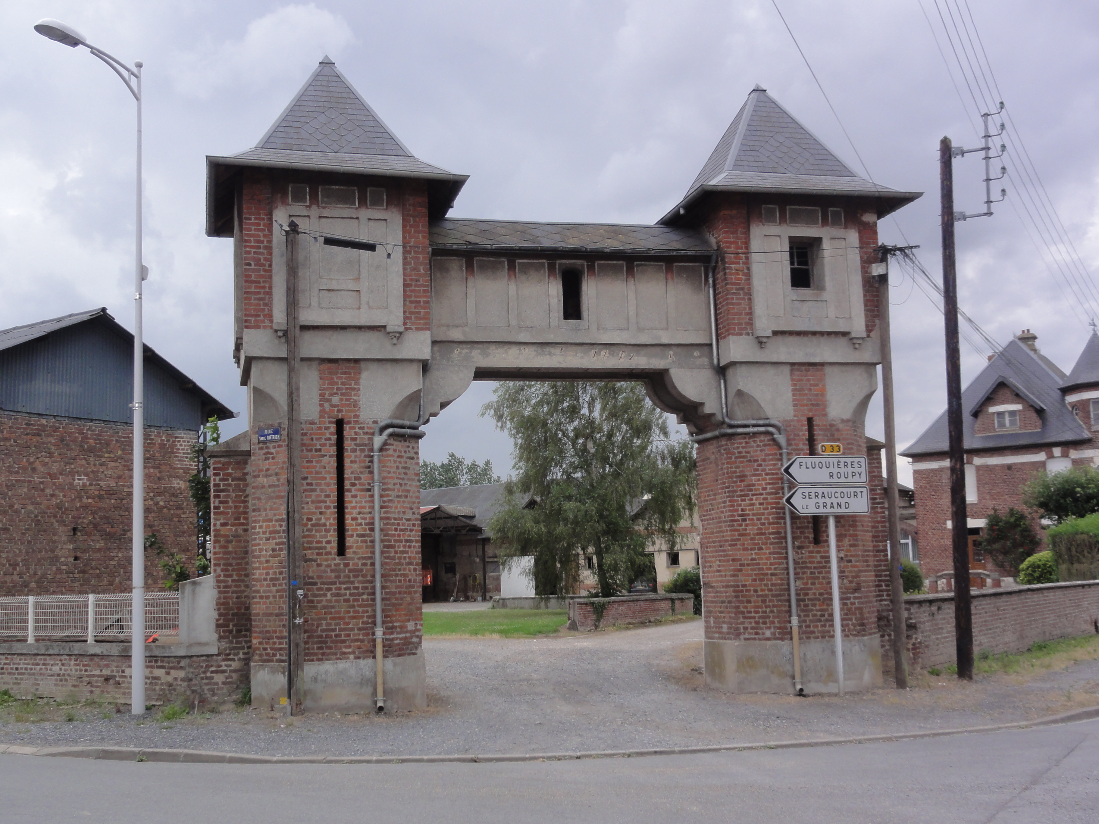 Étreillers (Aisne) porche de ferme